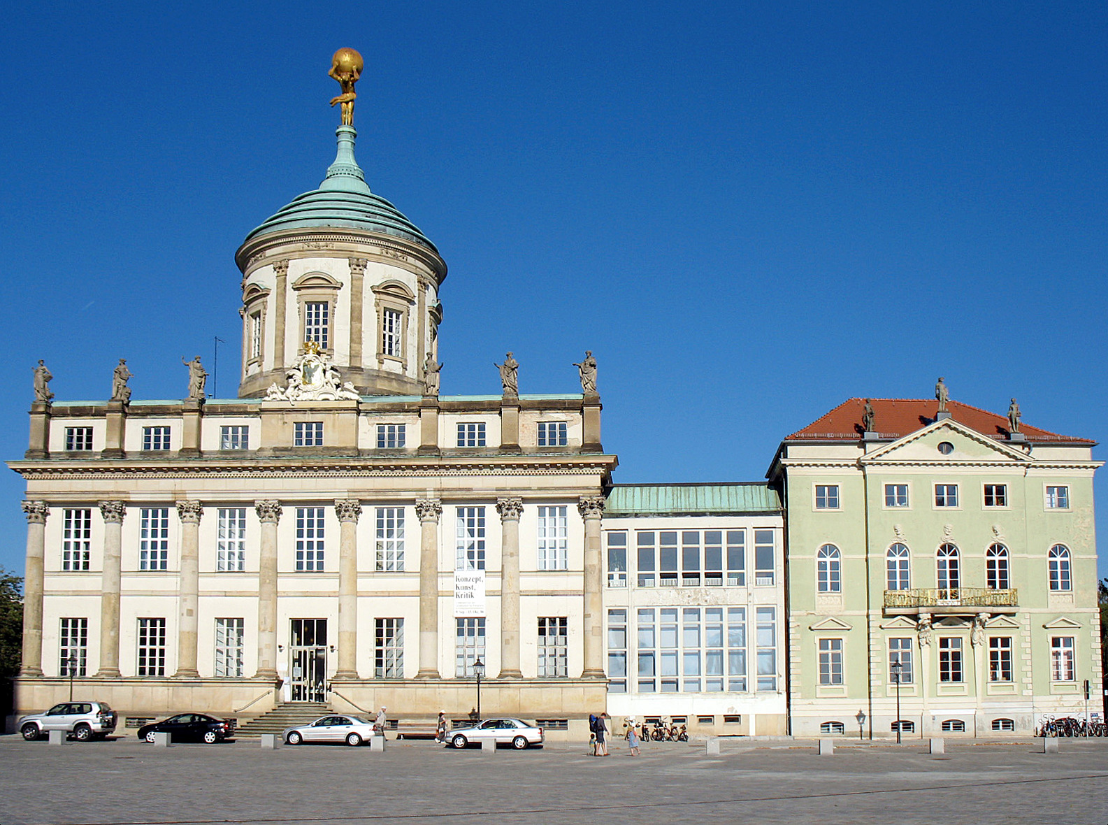 Das Alte Rathaus am alten Markt von Potsdam